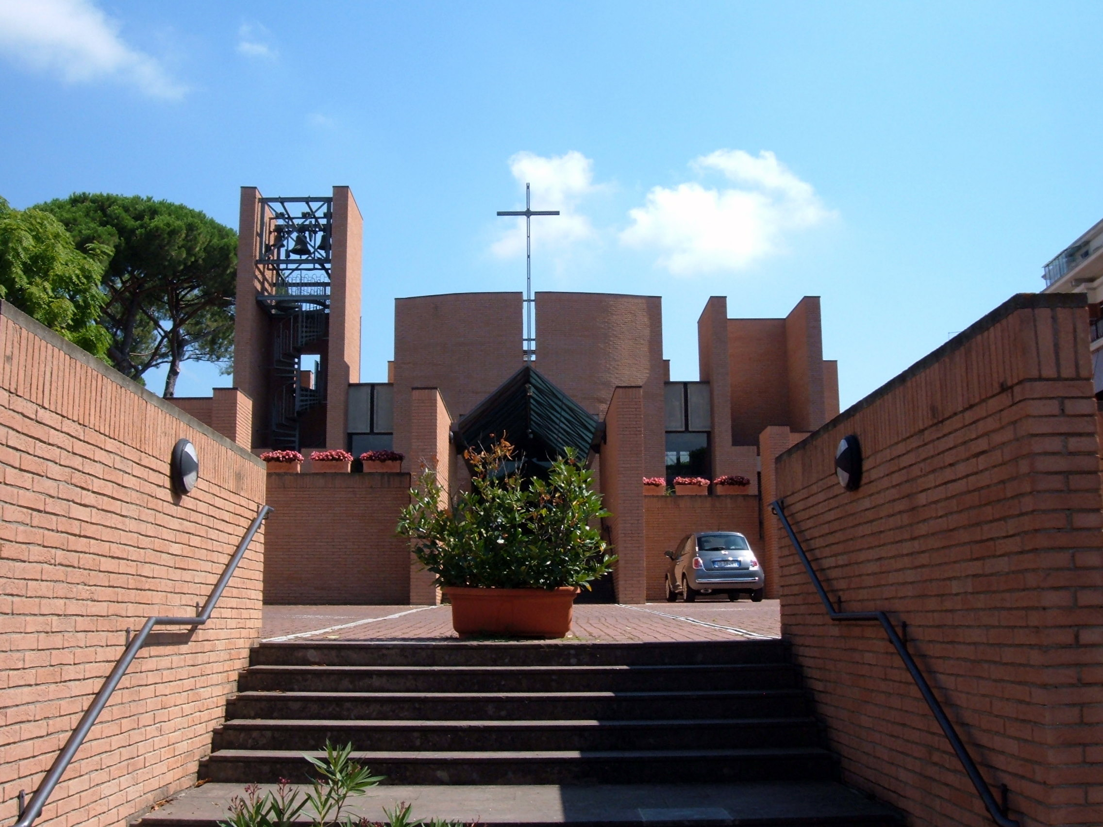 Chiesa di San Giuliano martire, a Roma, sulla via Cassia, nella zona Tomba di Nerone (Z.LIII.)